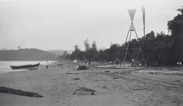 Foto. Strand bij Painan, Pad. Bovenlanden